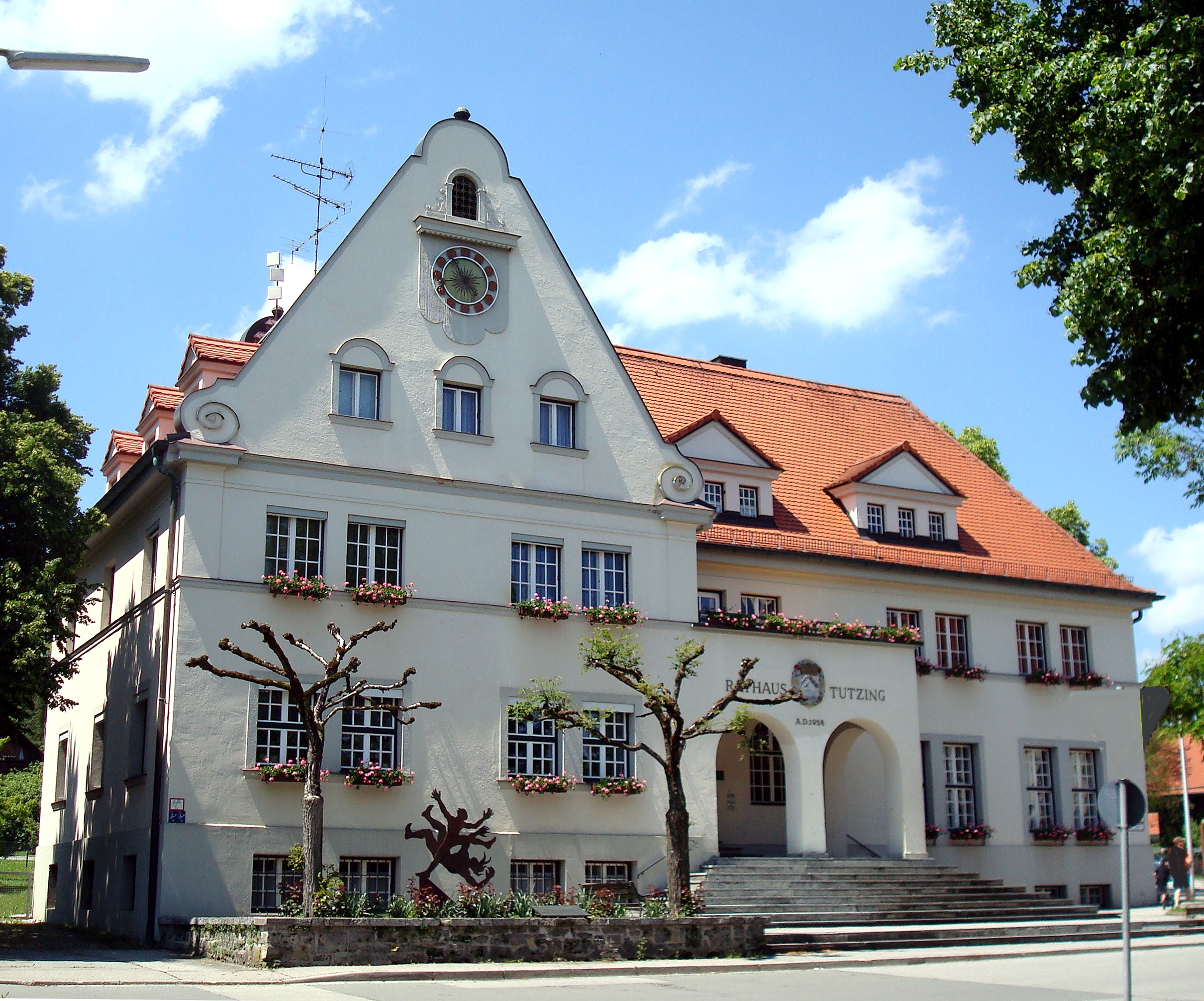 Tutzing, Kirchenstraße 9. Rathaus der Gemeinde Tutzing am Starnberger See.